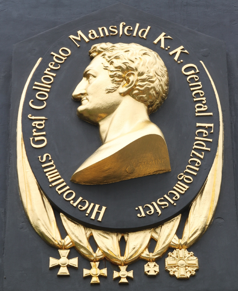 Arbesau (Varvažov): Abbildung des österreichischen Generals Hieronymus von Colloredo-Mansfeld (1775-1822). Das Medaillon ist Bestandtei des österreichischen Denkmals in Erinnerung an die Schlacht bei Kulm 1813. Das Denkmal wurde 1825 nach einem Entwurf von Oberstleutnant Ourlandie errichtet wurde. Es handelt sich um einen gusseisernen Obelisk, dessen Teile in der Eisenhütte Neujoachimsthal (Nový Jáchymov) gegossen wurden. Mit einem Gewicht von 113 Tonnen und einer Höhe von 17 Metern handelt es sich um das bedeutendste Gusswerk der Hütte. Das Denkmal krönt ein Doppeladler mit Lorbeerkranz. Bildhauer war Wenzel Prachner aus Prag.